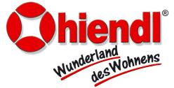 Logo bis zur übernahm von XXXLutz im Jahr 2007